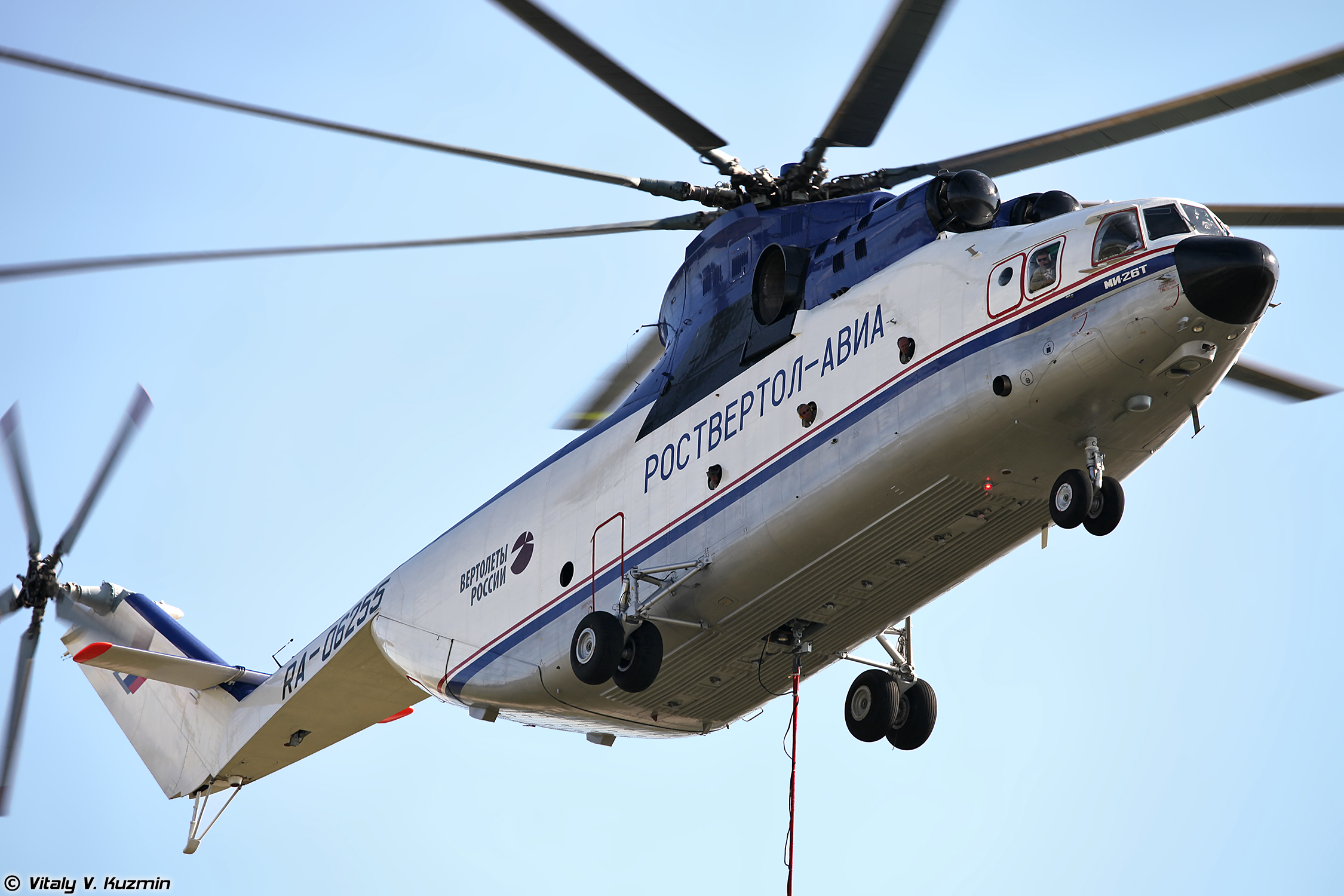 Ми-26Т с водосливным устройством (Mi-26T)